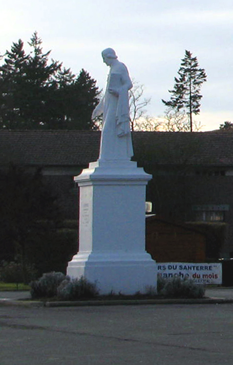 Chaulnes (Somme, France) - La statue de Charles François Lhomond se dressant, toute blanche, devant la Mairie, sur la place principale.